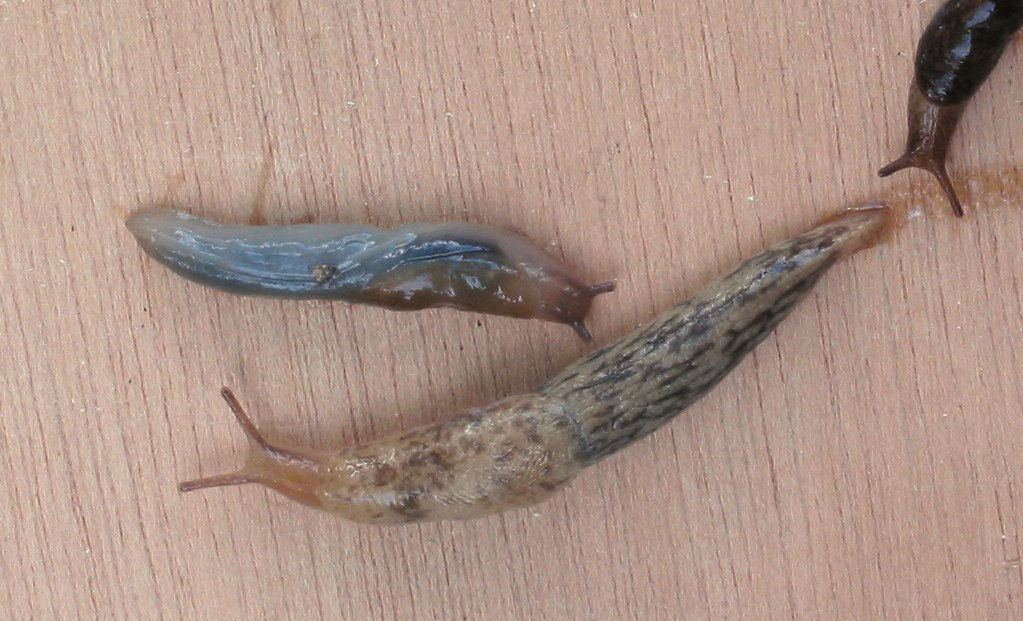 zelfgemaakte foto van een gevlekte akkerslak (Deroceras reticulatum)